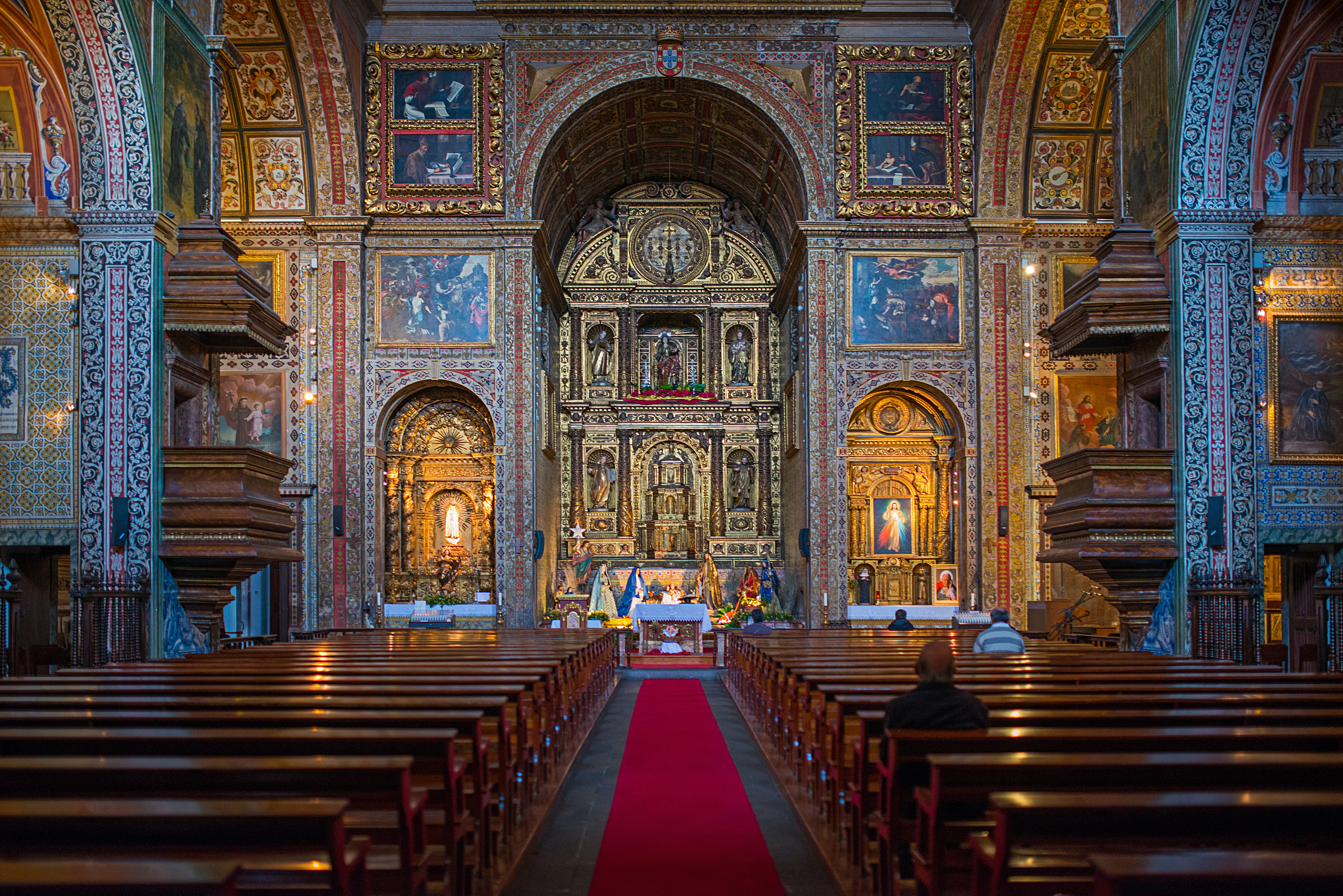 Funchal Madeira Portugal January 2013